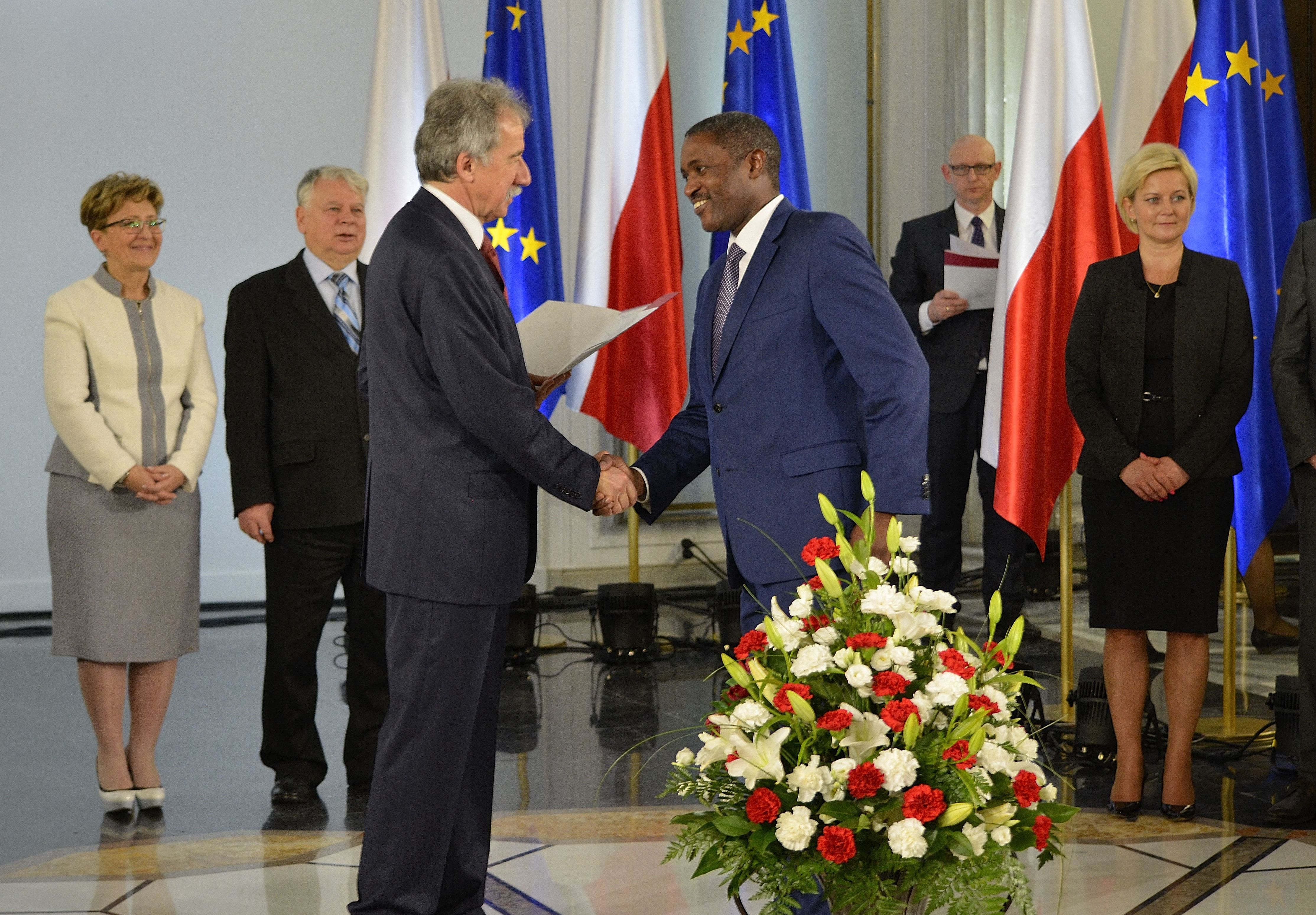 Poseł Killion Munyama podczas uroczystości wręczenia zaświadczeń o wyborze nowo wybranym posłom w Sali Kolumnowej Sejmu